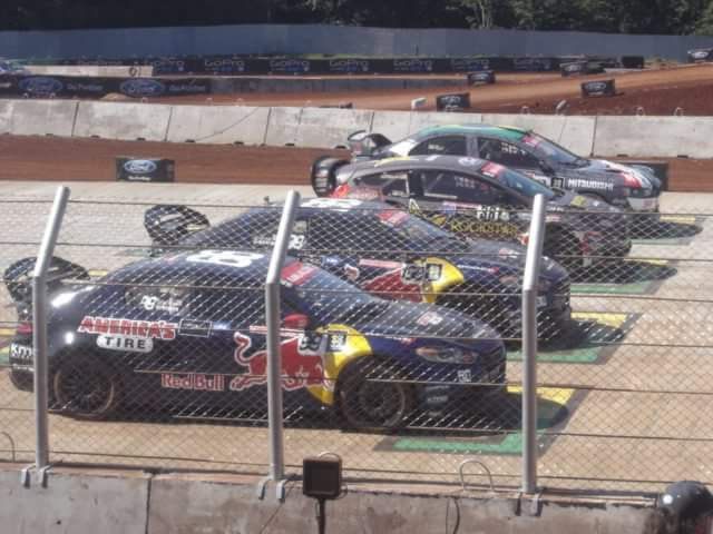 X Games Brazil in Iguassu Falls